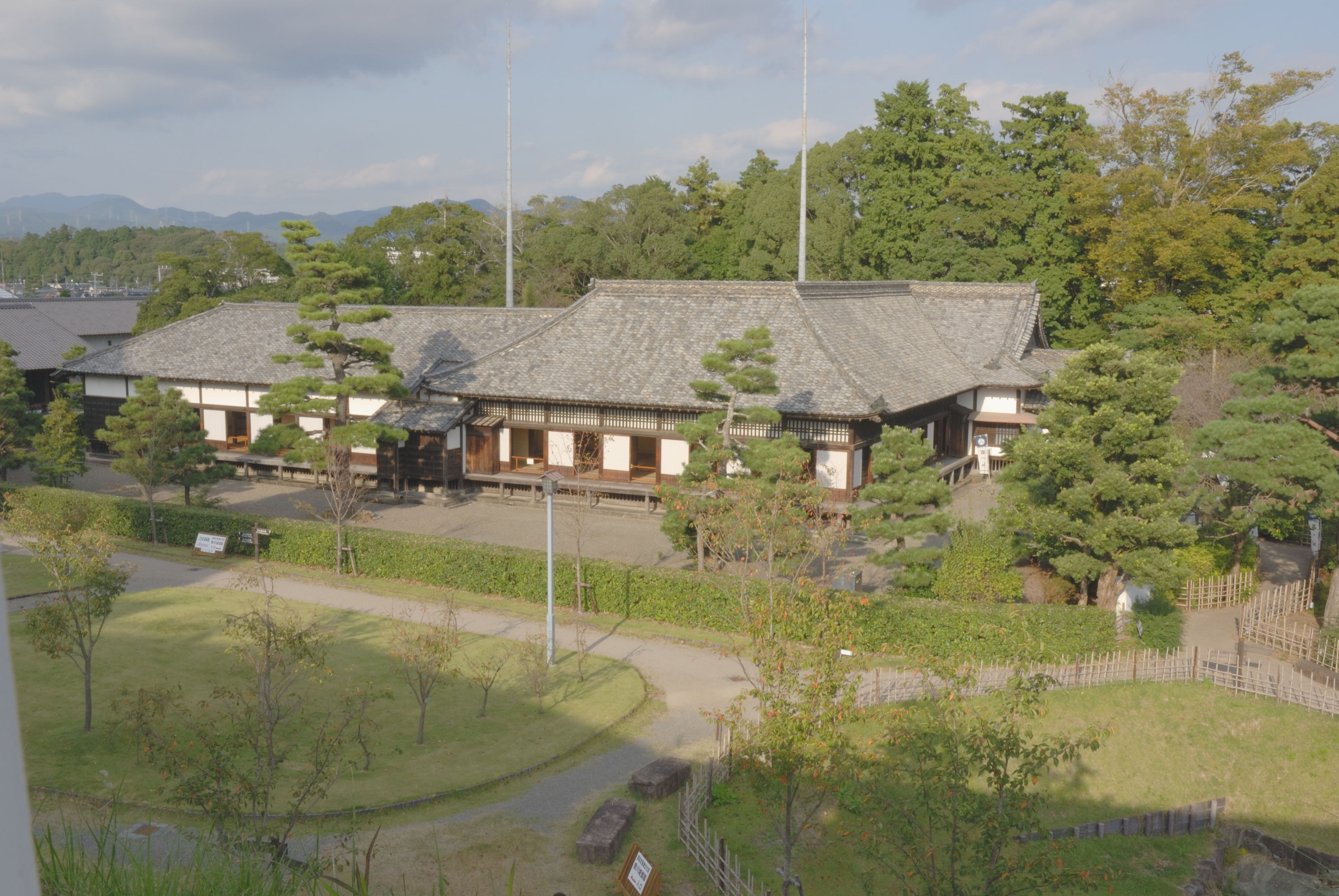 goten